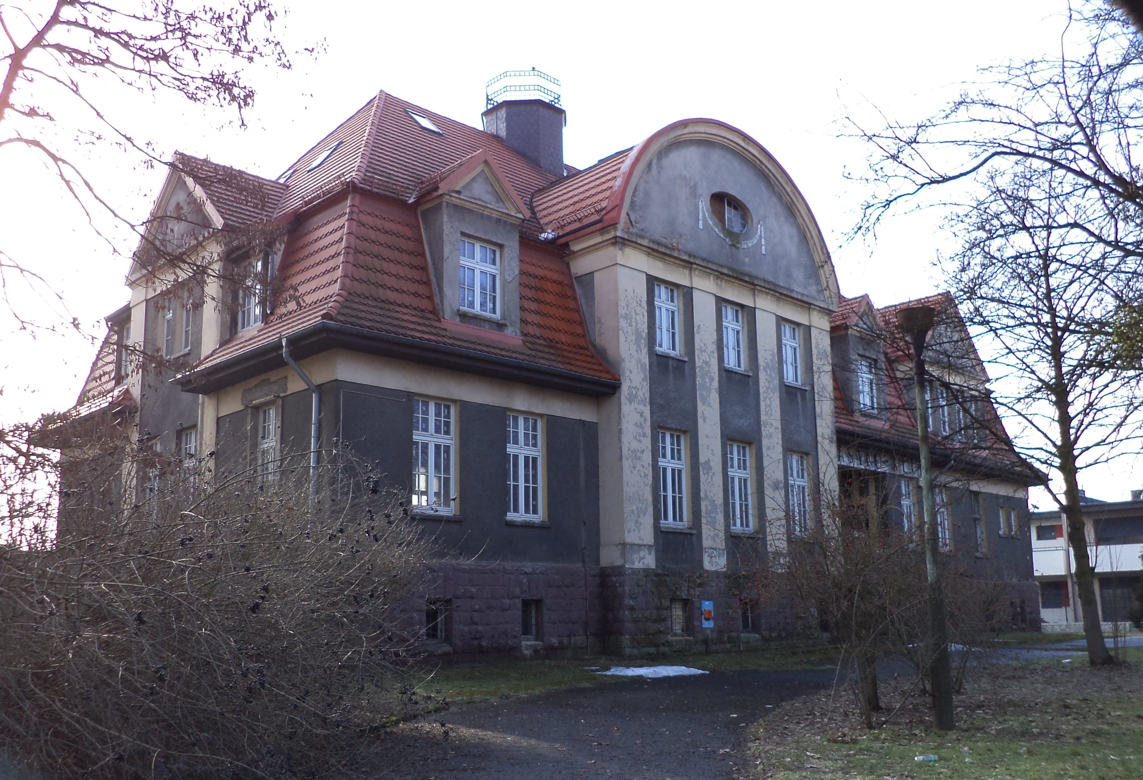 Category:Former Casino in Tarnowskie Góry